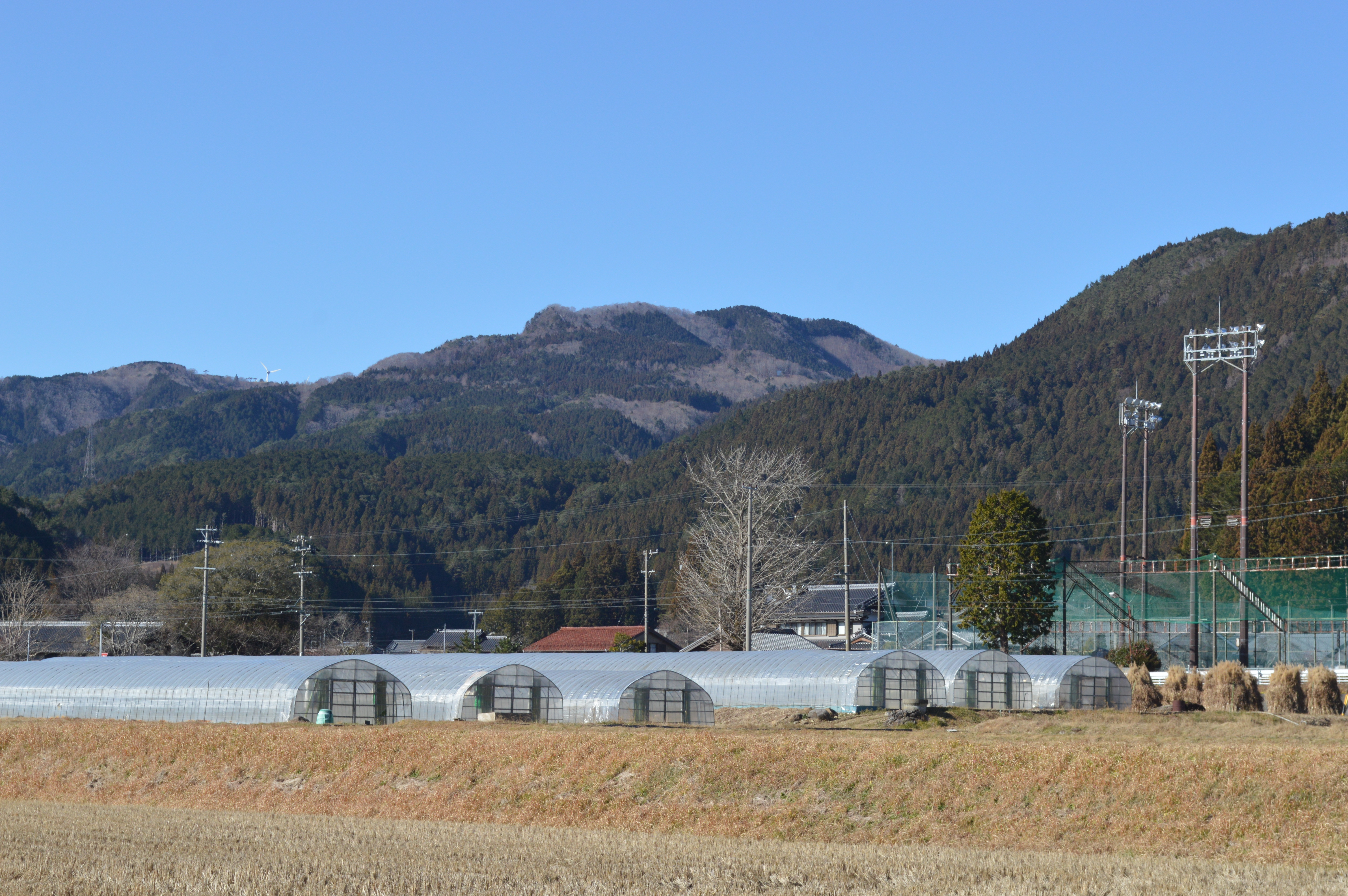 井山（中央）。1195m。愛知県北設楽郡設楽町と愛知県豊田市にまたがる。設楽町津具滝本から撮影。山頂の左に面ノ木風力発電所の風車が見えている。手前右端は津具スポーツ広場。